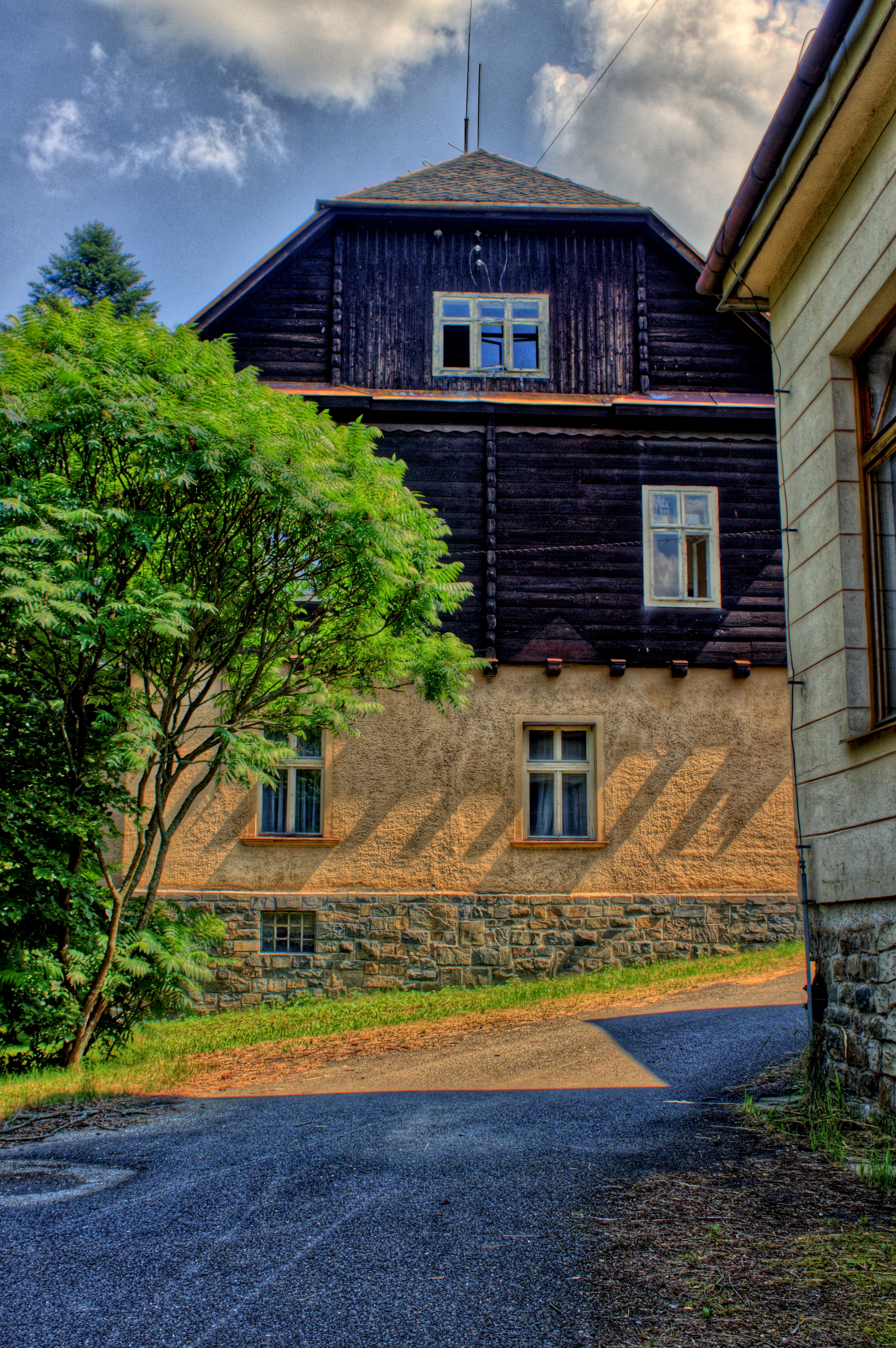 Lázeňský dům - areál lázní, s omezením: bez čp. 105 Penzion Marie na pozemku st. parc. č. 105, k. ú. Staré Těchanovice a pozemku parc. č. 1164, k. ú. Moravice (Jánské Koupele), Jánské Koupele 75